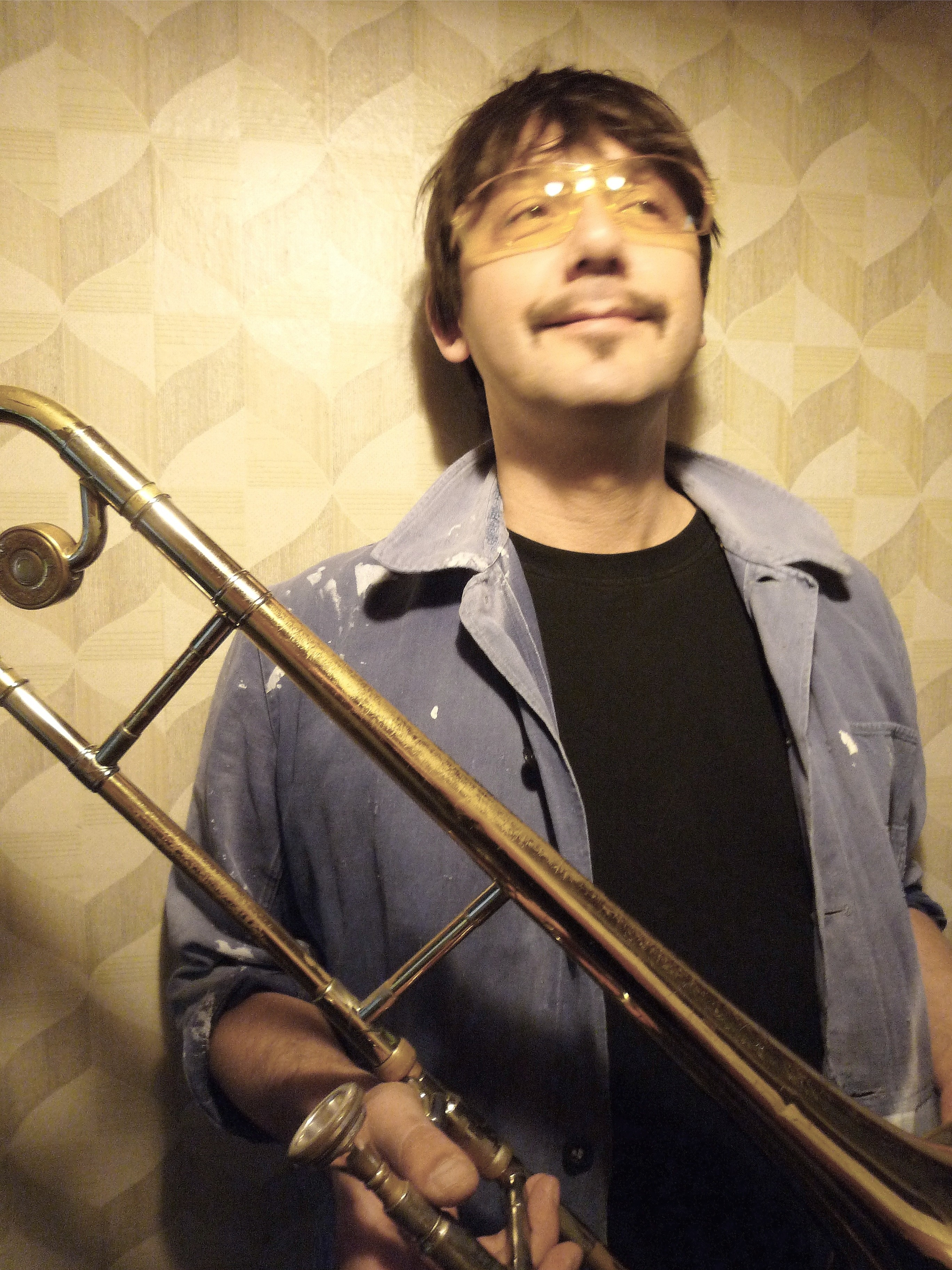 gerhard gschloessl, trombone & sousaphone from berlin/germany